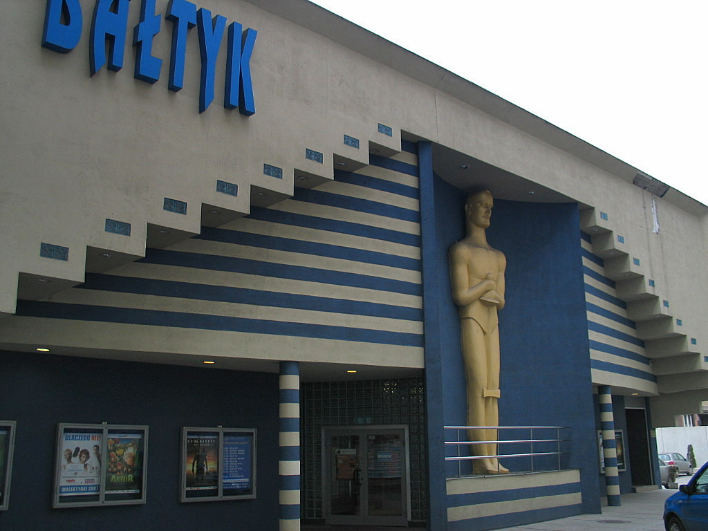 Kino Bałtyk w Łodzi